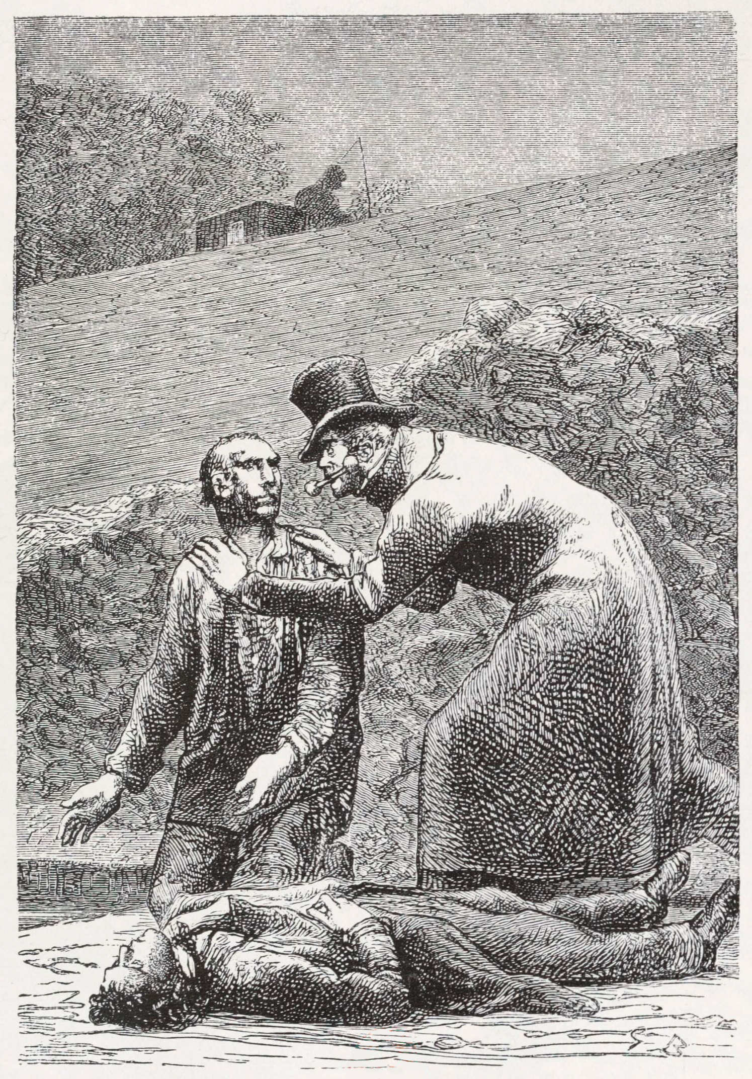 Sur la berge, illustration de Gustave Brion pour Les Misérables de Victor Hugo, édition Hetzel.